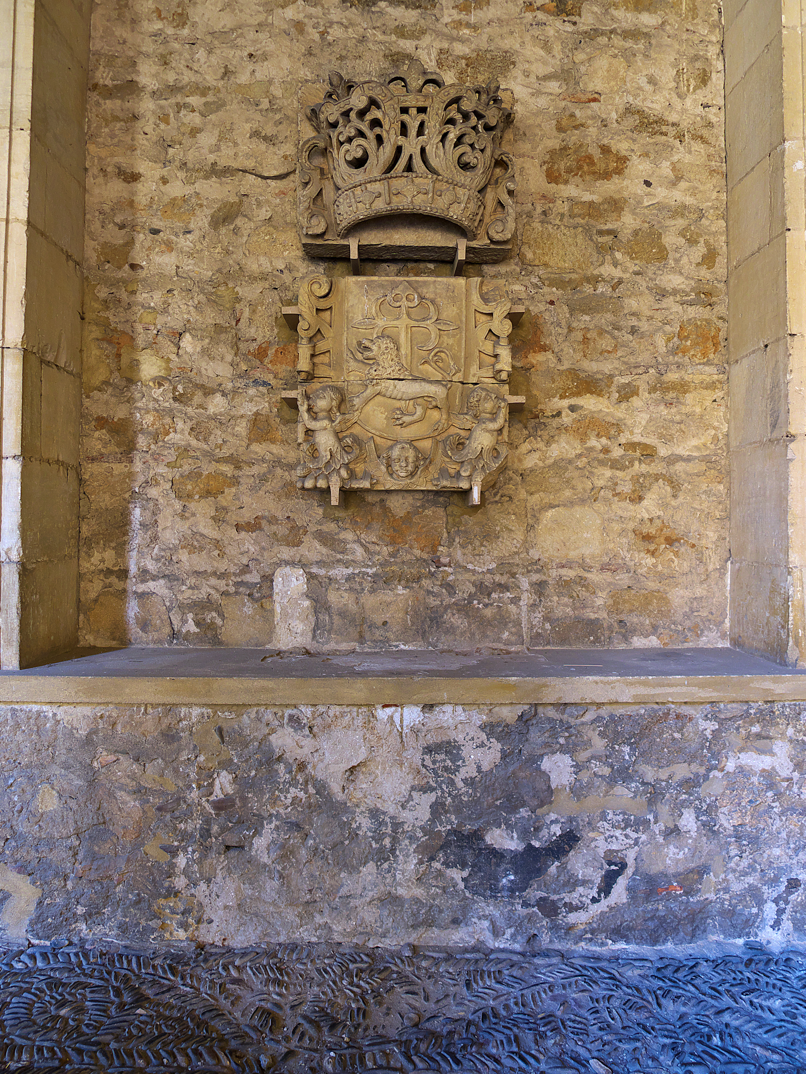 Claustro del Convento de San Marcos (León). La cruz de la Orden de Santiago y el león.